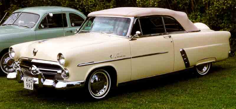 Ford 76B Crestline Sunliner Convertible Coupé 1952